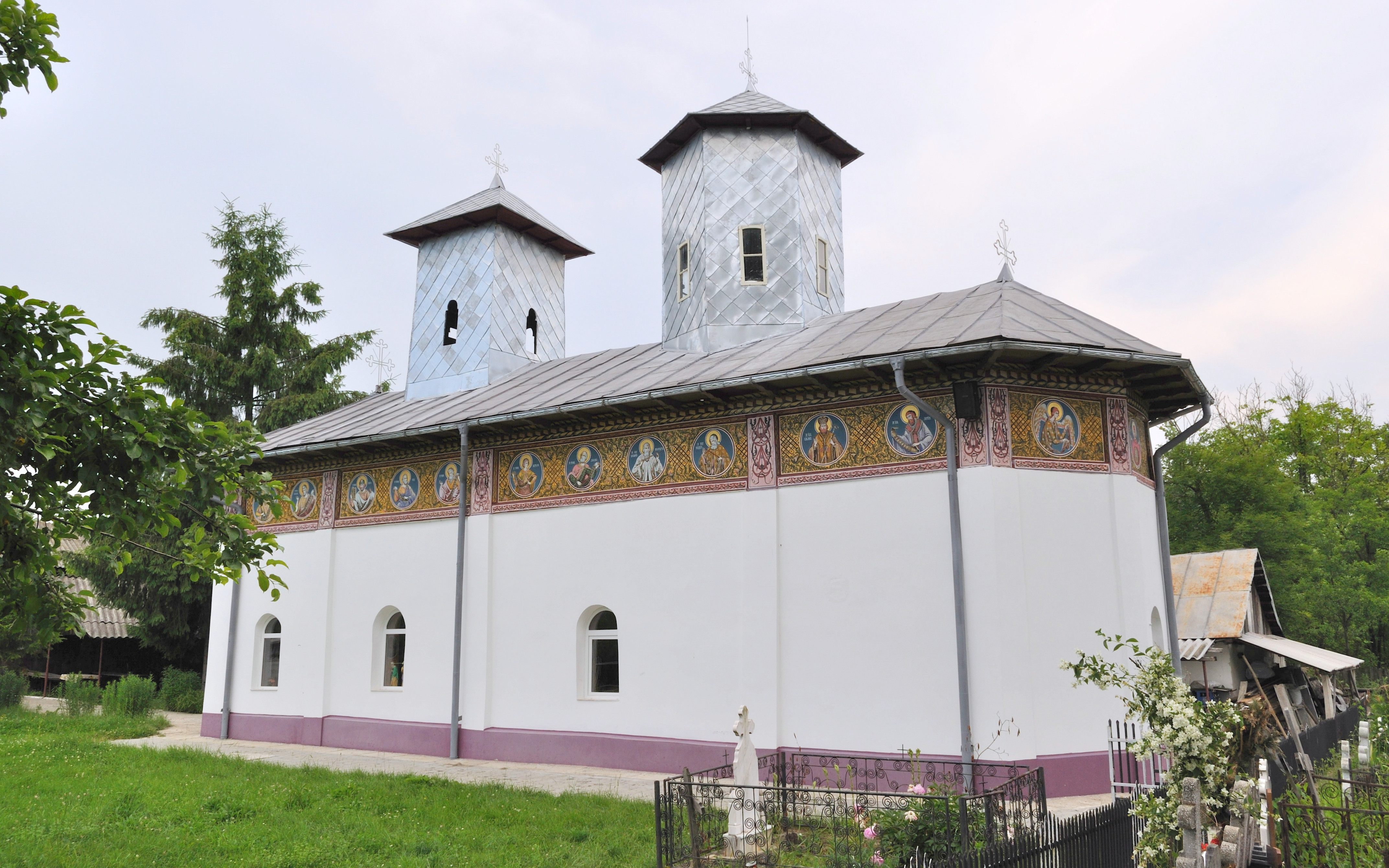 Biserica monument „Sf.Trei Ierarhi” din Foleștii de Jos, Vâlcea